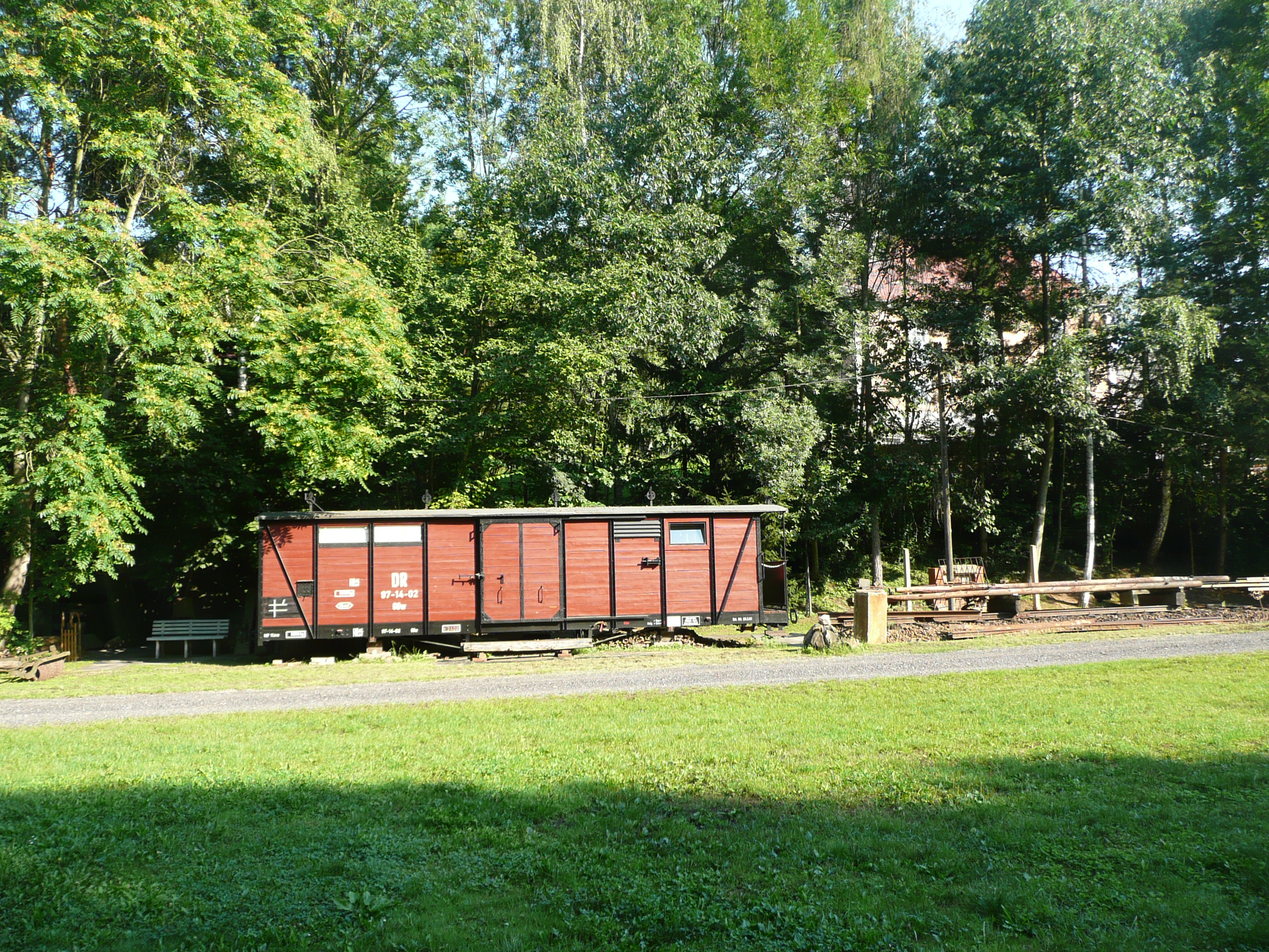 ehemalige Bahnstation Beicha